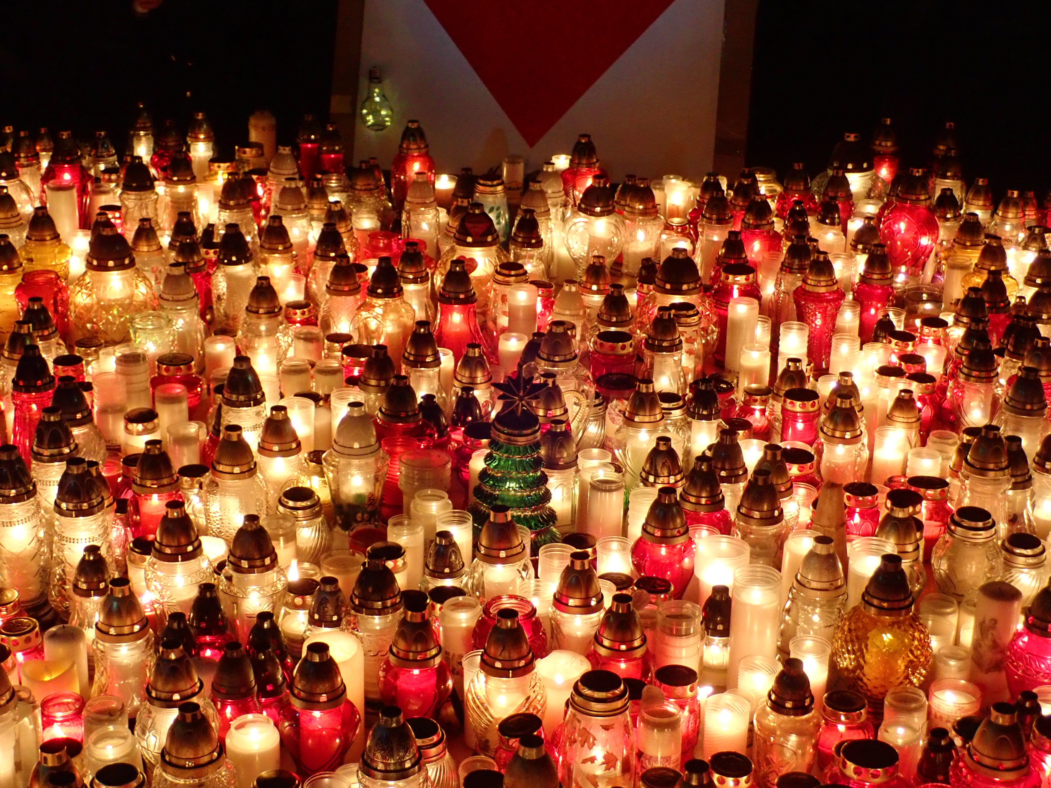 Największe Serce Świata – serce ułożone ze zniczy na placu Solidarności w Szczecinie w dniu 16 stycznia 2019 dla upamiętnienia zamordowanego prezydenta Gdańska Pawła Adamowicza.